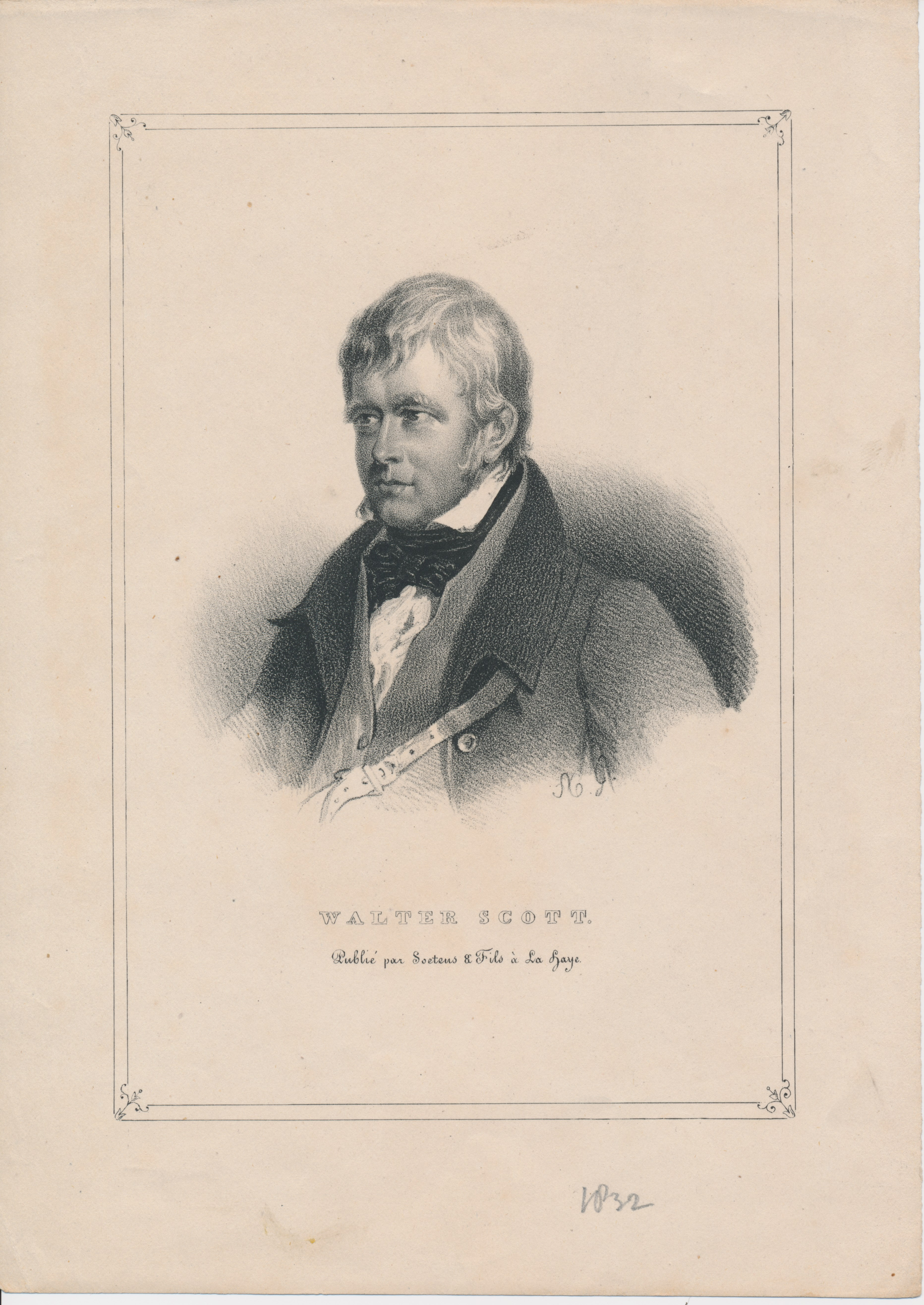 Walter Scott 1771-1832